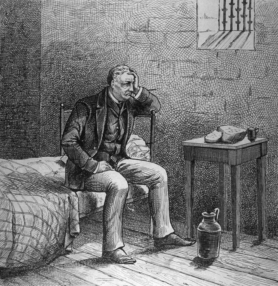 L'opinion publique, Vol. 6, no. 33, pp. 392 (19 August 1875)